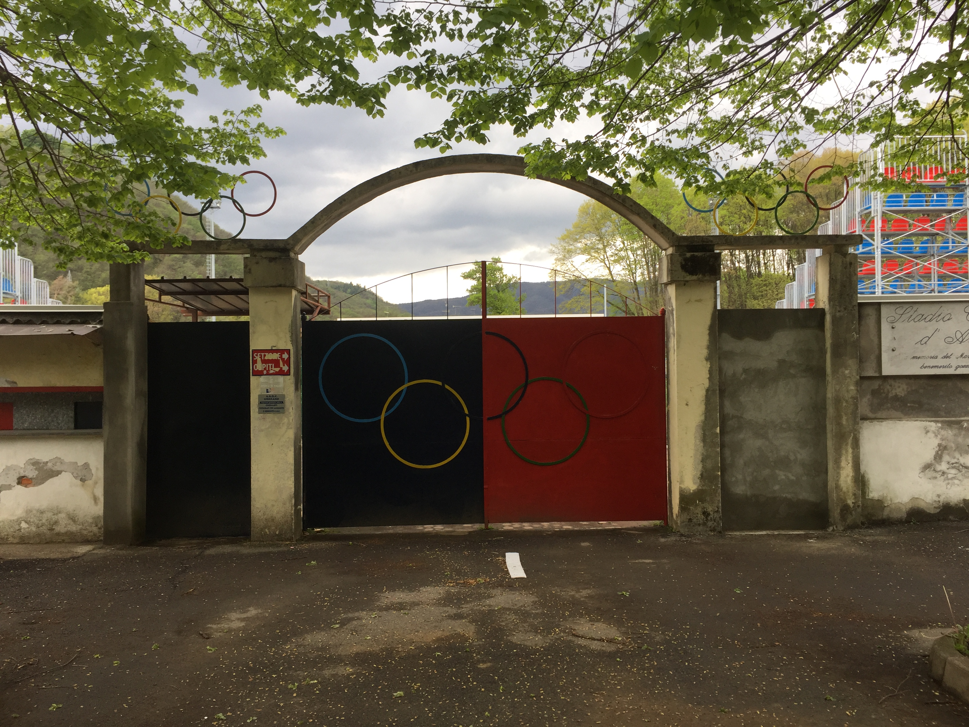 Cancello d'onore stadio comunale Gozzano (IT-NO)